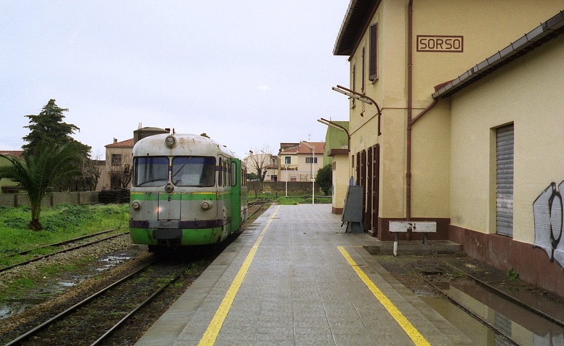 Automotrice ADm 51 delle Ferrovie della Sardegna in sosta a Sorso